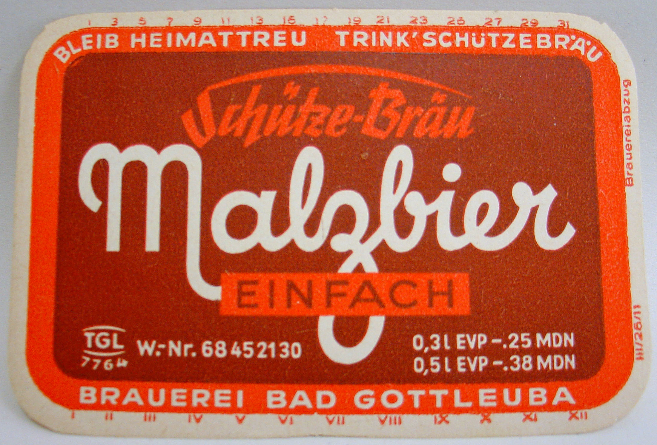 Flaschenetikette der Schütze-Bräu Brauerei Bad Gottleuba, Malzbier Einfach